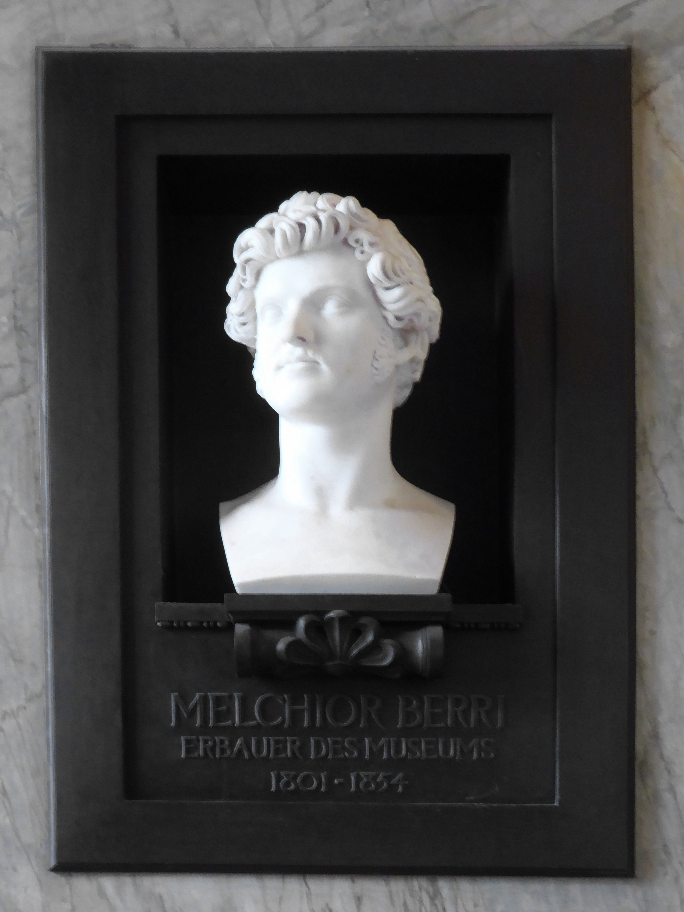 Melchior Berri (1801–1854) Architekt Büste im Museum an der Augustinergasse in Basel